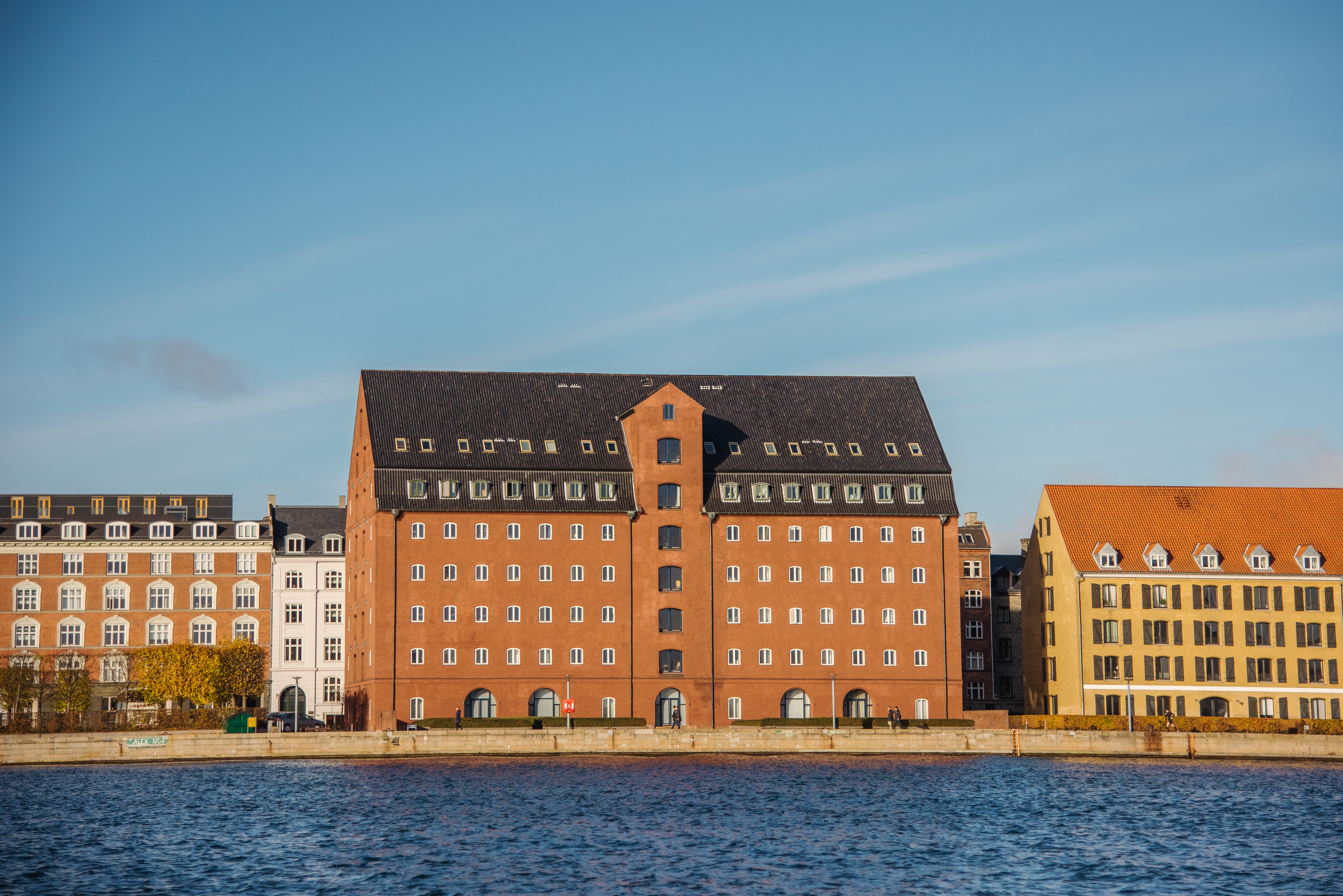 Det Blå Oakhus in Copenhagen, Denmark